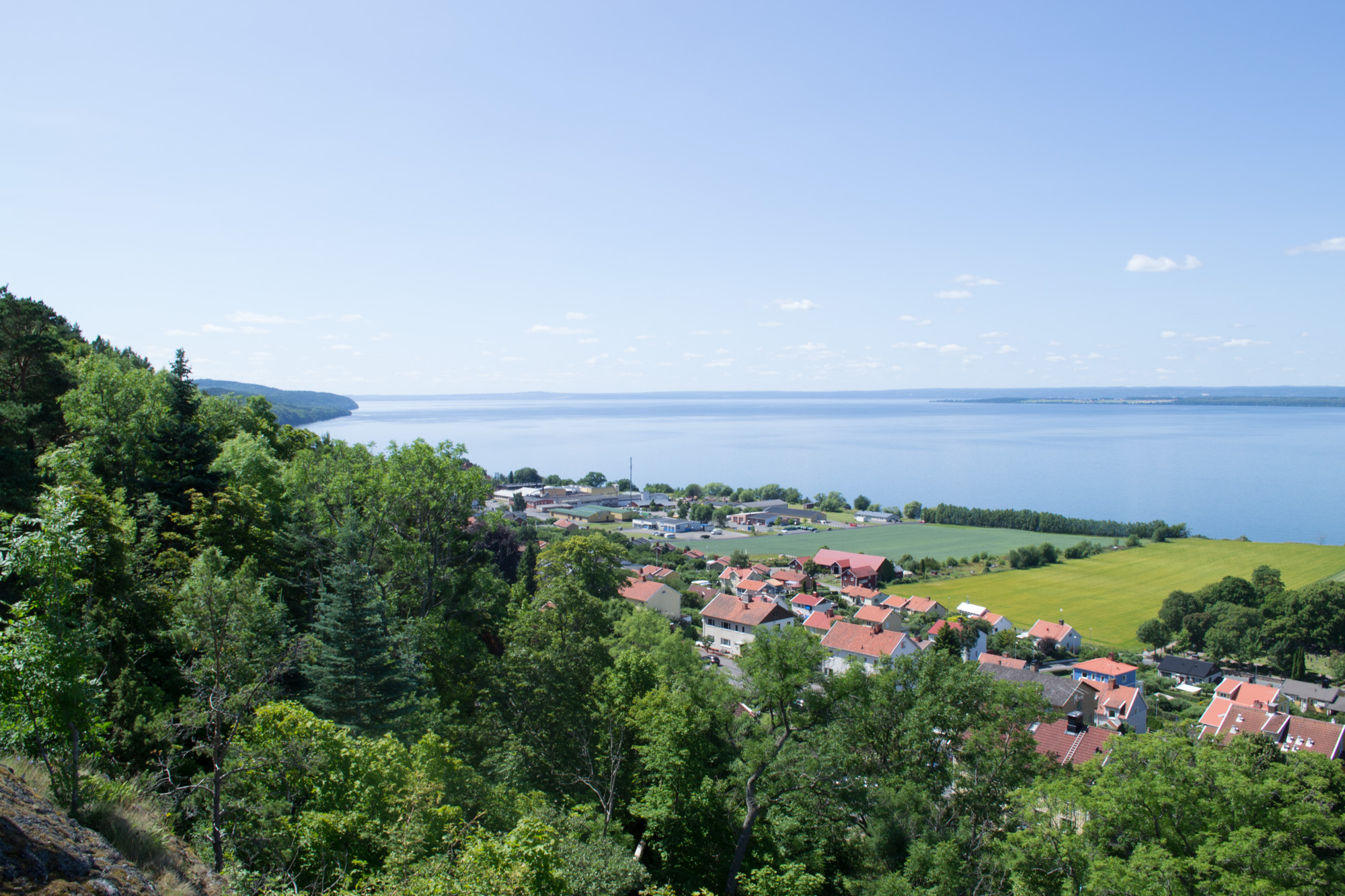 Utsikt från Grännaberget mot Jönköping